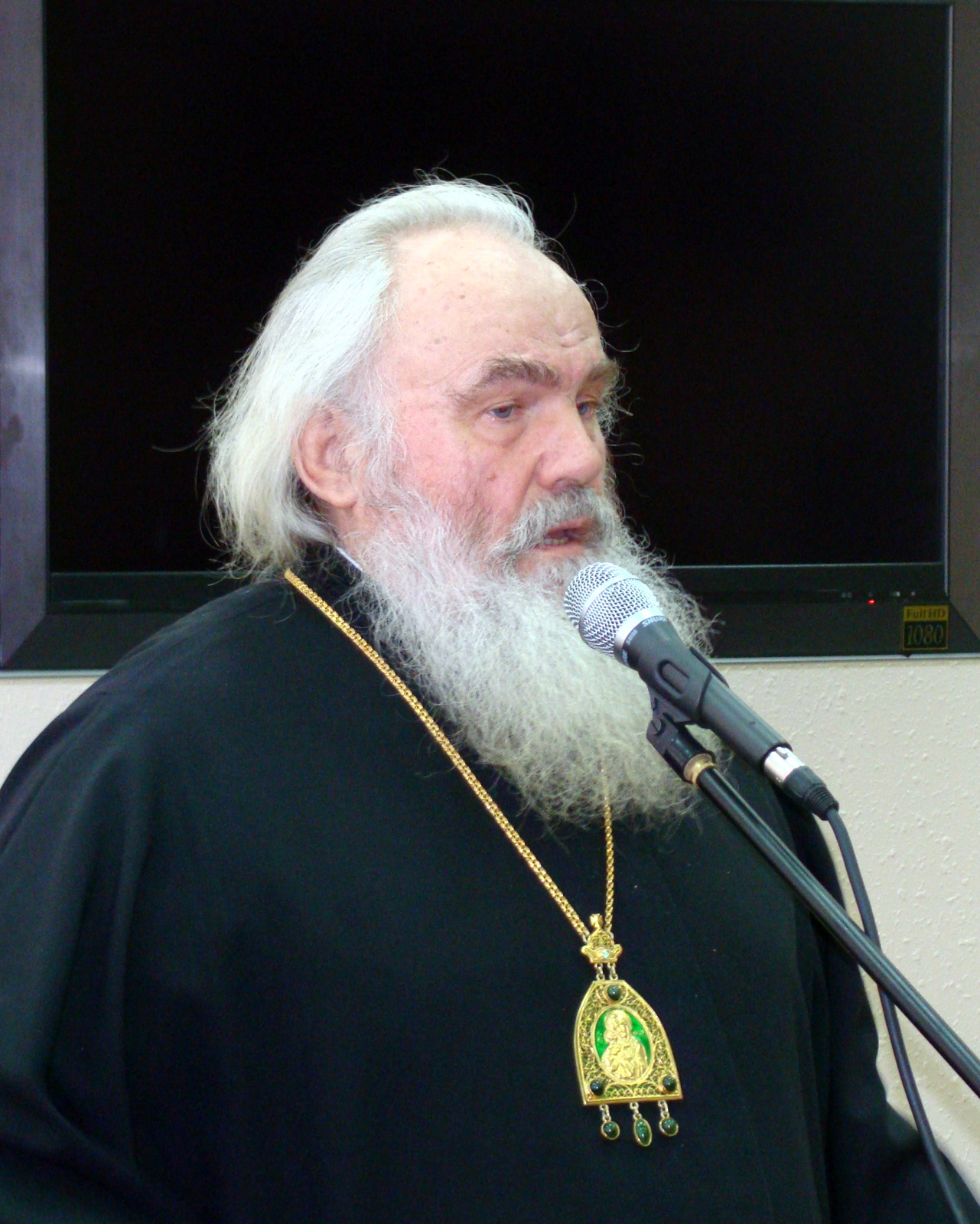 Veniamin, Erzbischof von Wladiwostok und Primorje